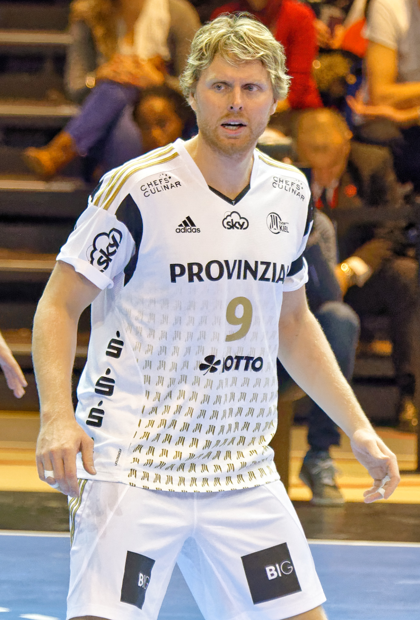 Rencontre de phase de groupe de ligue des champions 2015-16 entre le PSG et le THW Kiel. A la Halle Carpentier (Paris), le 22 novembre 2015.